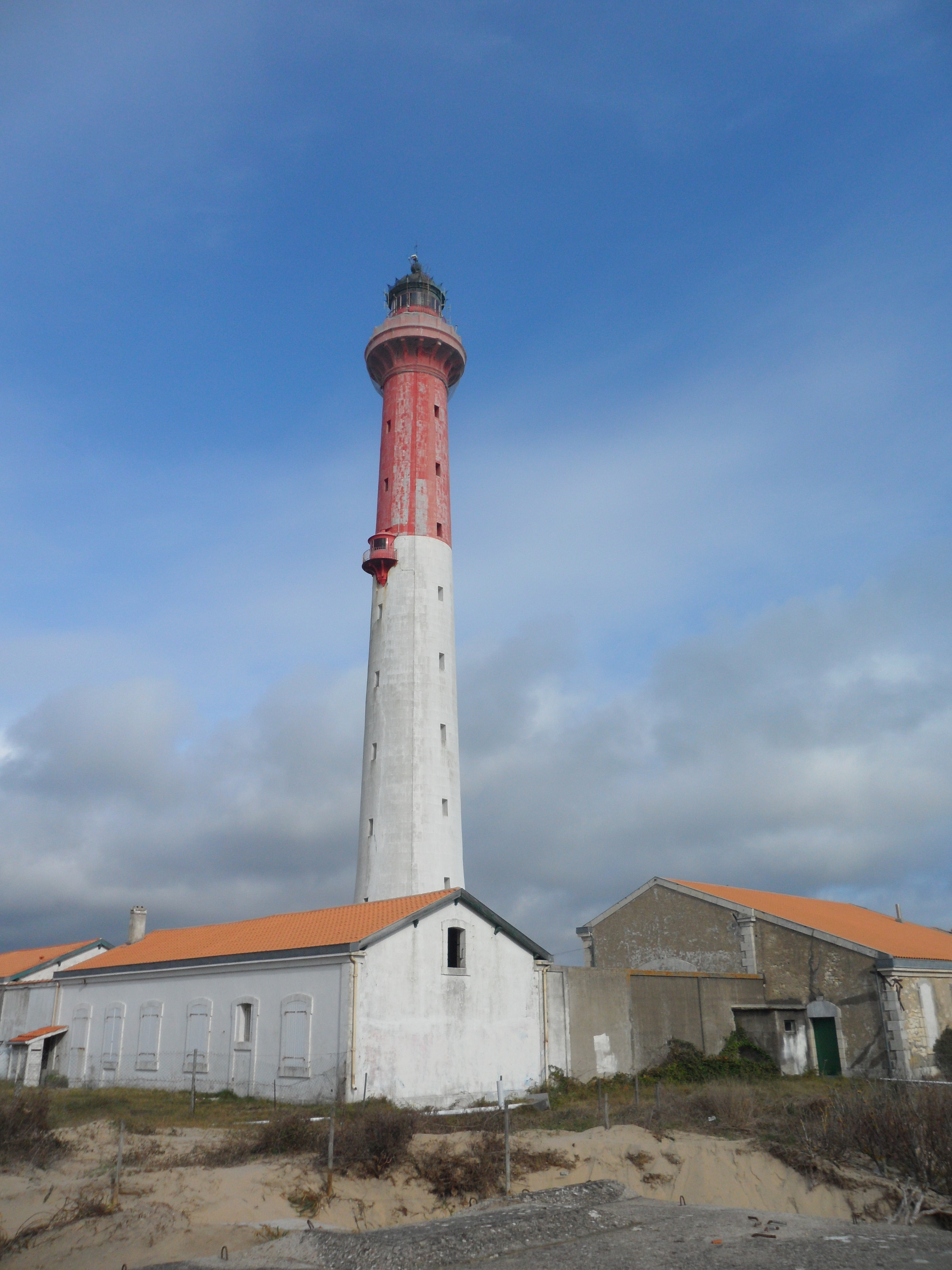 Phare de la coubre